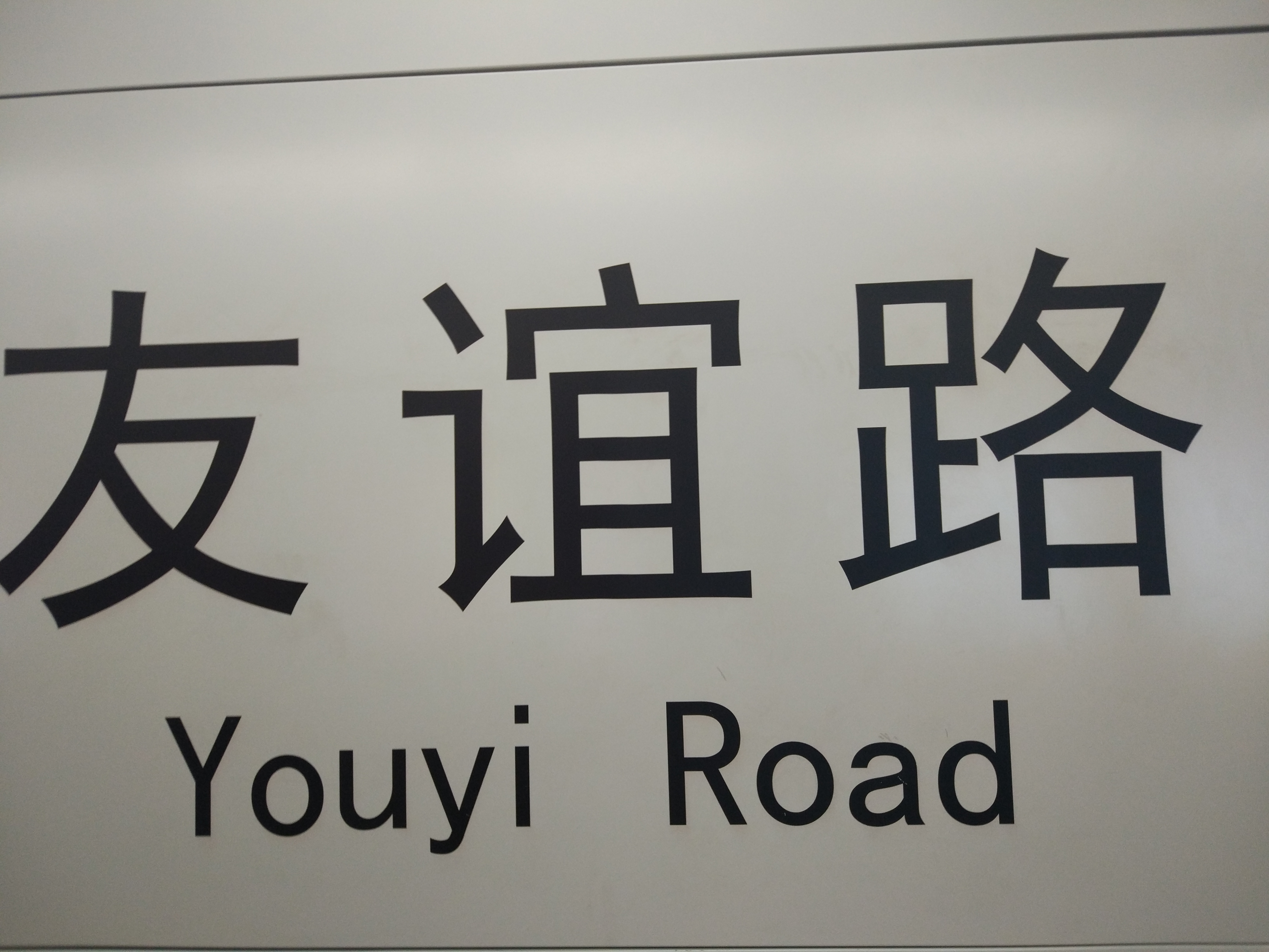 友谊路地铁站标志